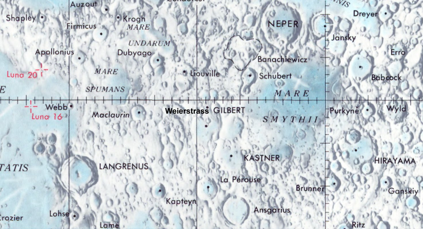 Cráter lunar Weierstrass. Localización. (Lunar Chart LPC1. Second Edition)